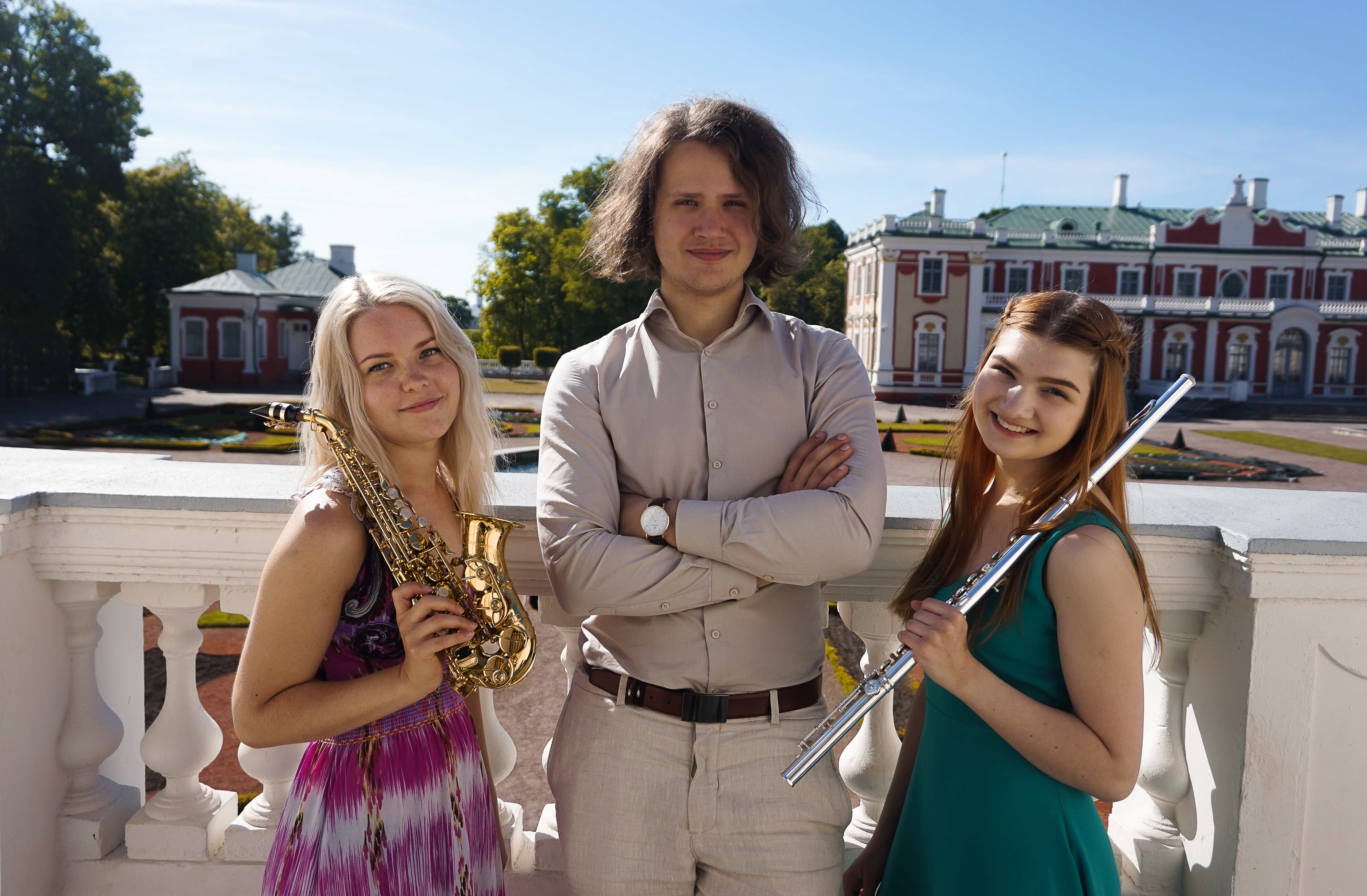 8. juuli päevakontserdid "Klaver ja ootamatud külalised" esinejad Kadrioru pargis.